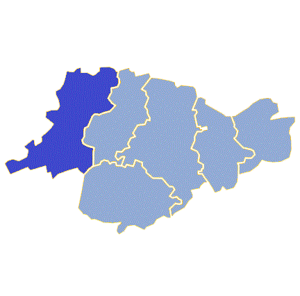 Powiat świebodziński - Gmina Łagów